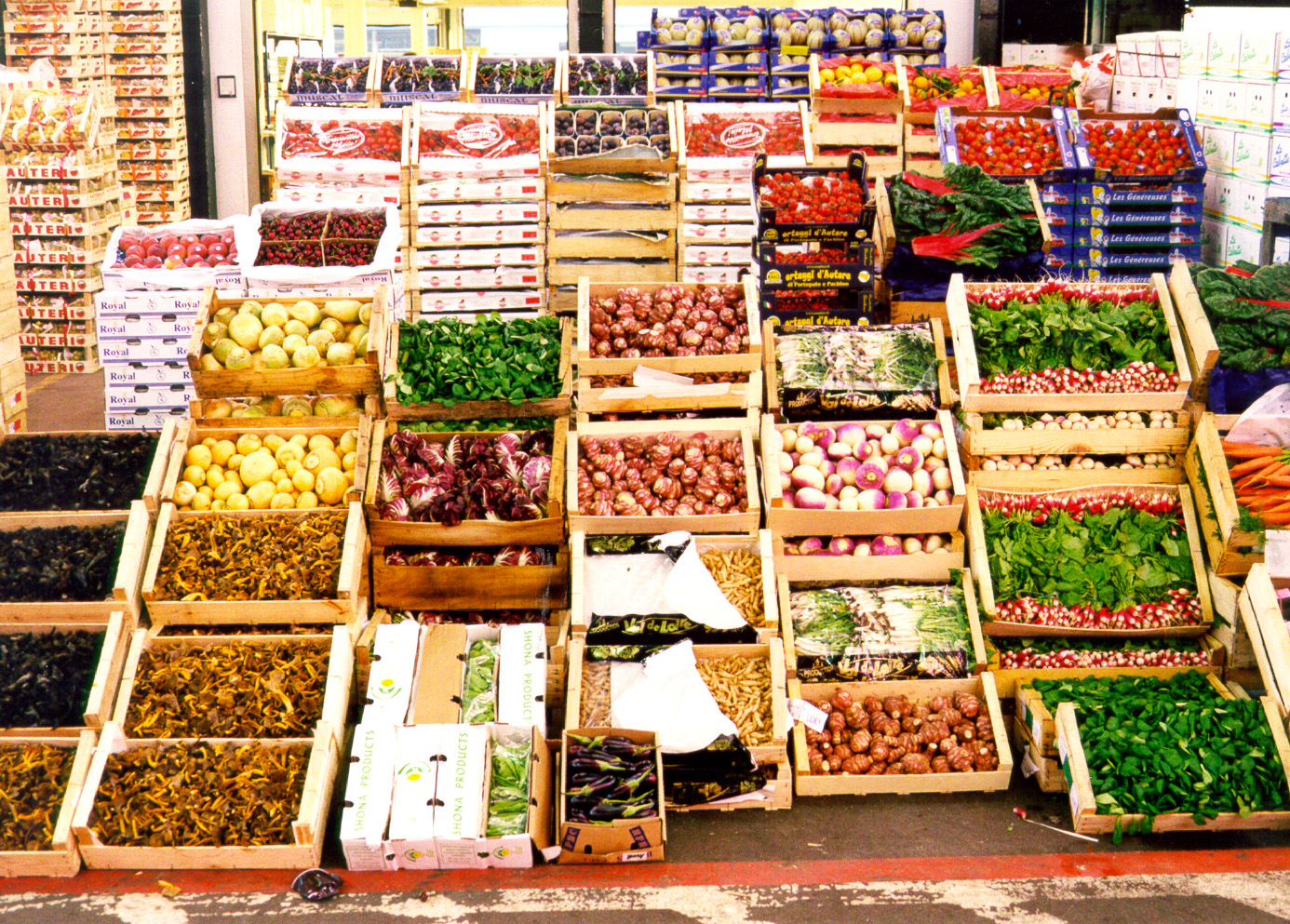 Étalage de marchandises aux Marché international de Rungis, France